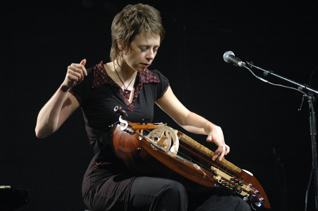 Musicienne Vielle à roue Electroacoustique